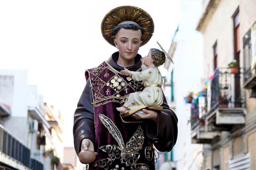 statua di Sant'Antonio acquistata dal fondatore, nel 1913.